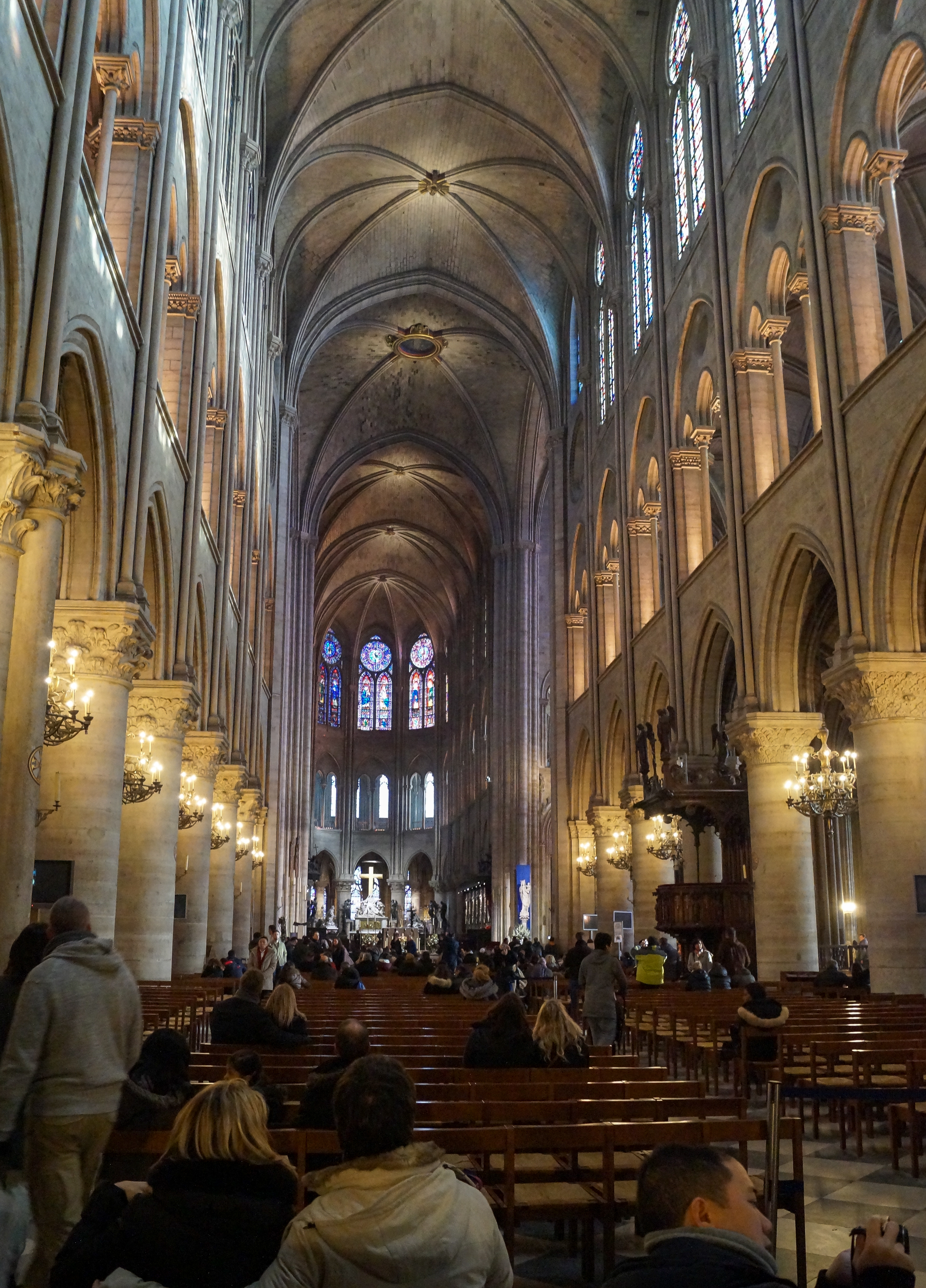 Innenansicht der Kathedrale Notre-Dame de Paris. .